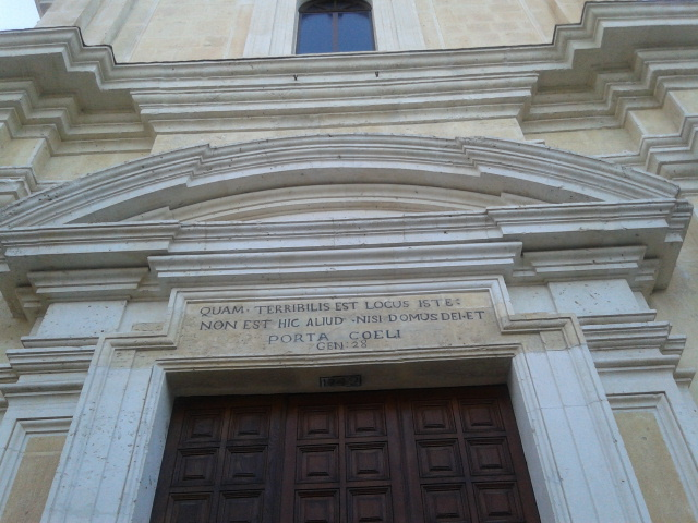 San Giovanni Decollato (iscrizione sul frontone)